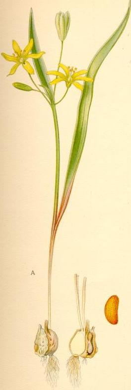 Vårlök (Gagea lutea)